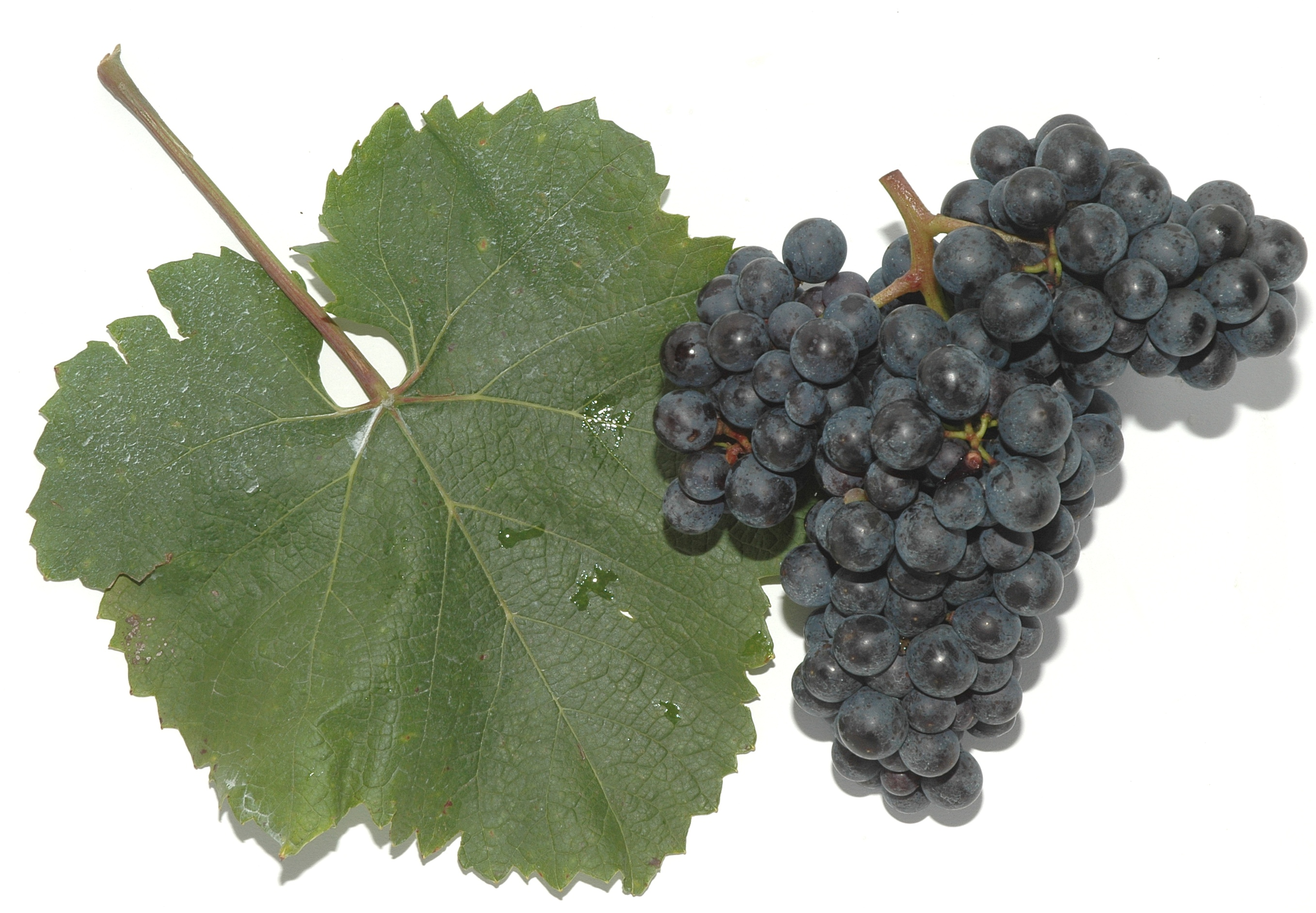 Traube und Blatt der Rebsorte ‘Zweigelt’.